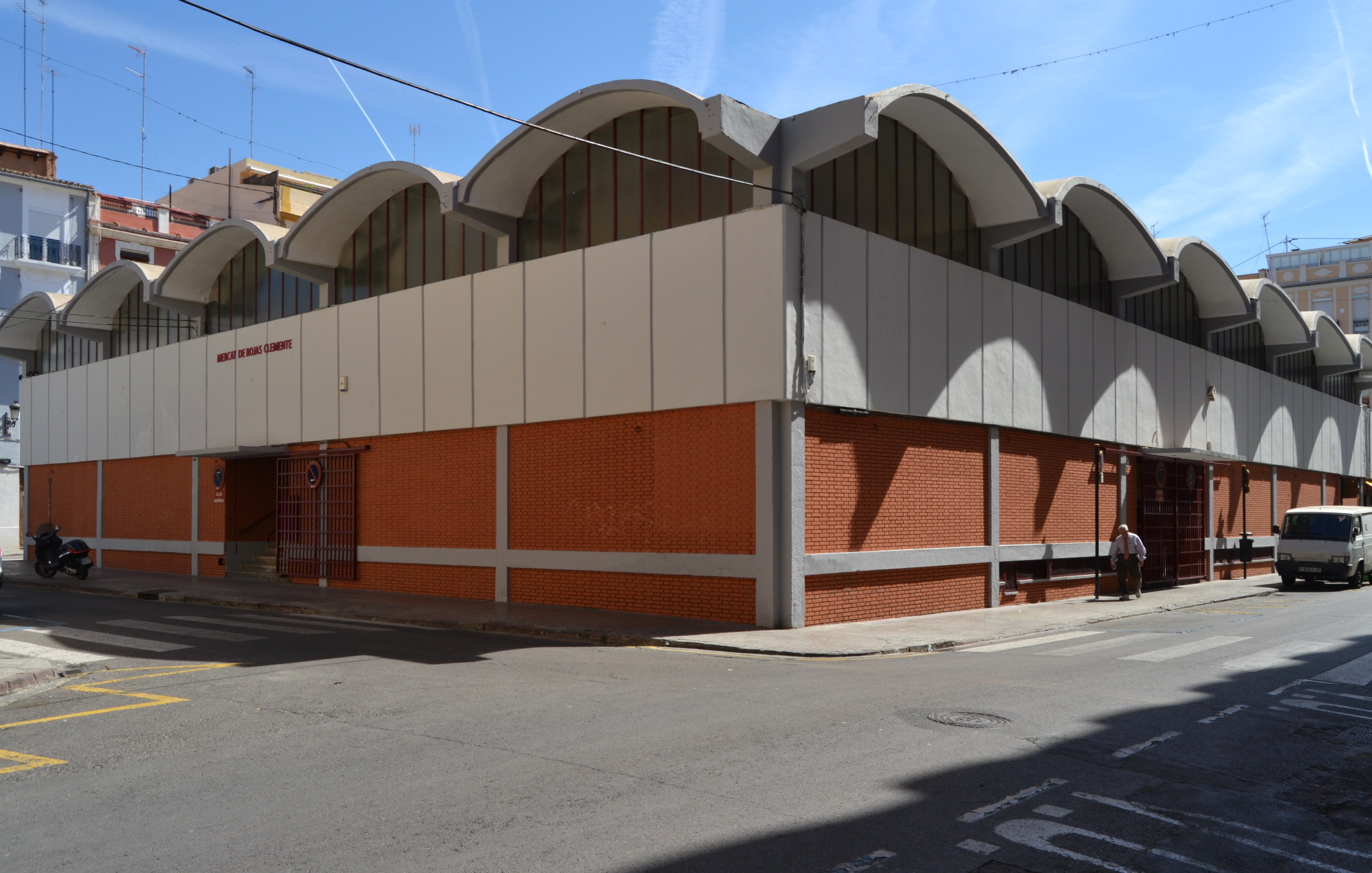 Exterior del mercat de Rojas Clemente de València.